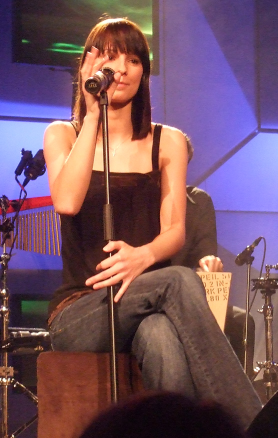 Christina Stürmer